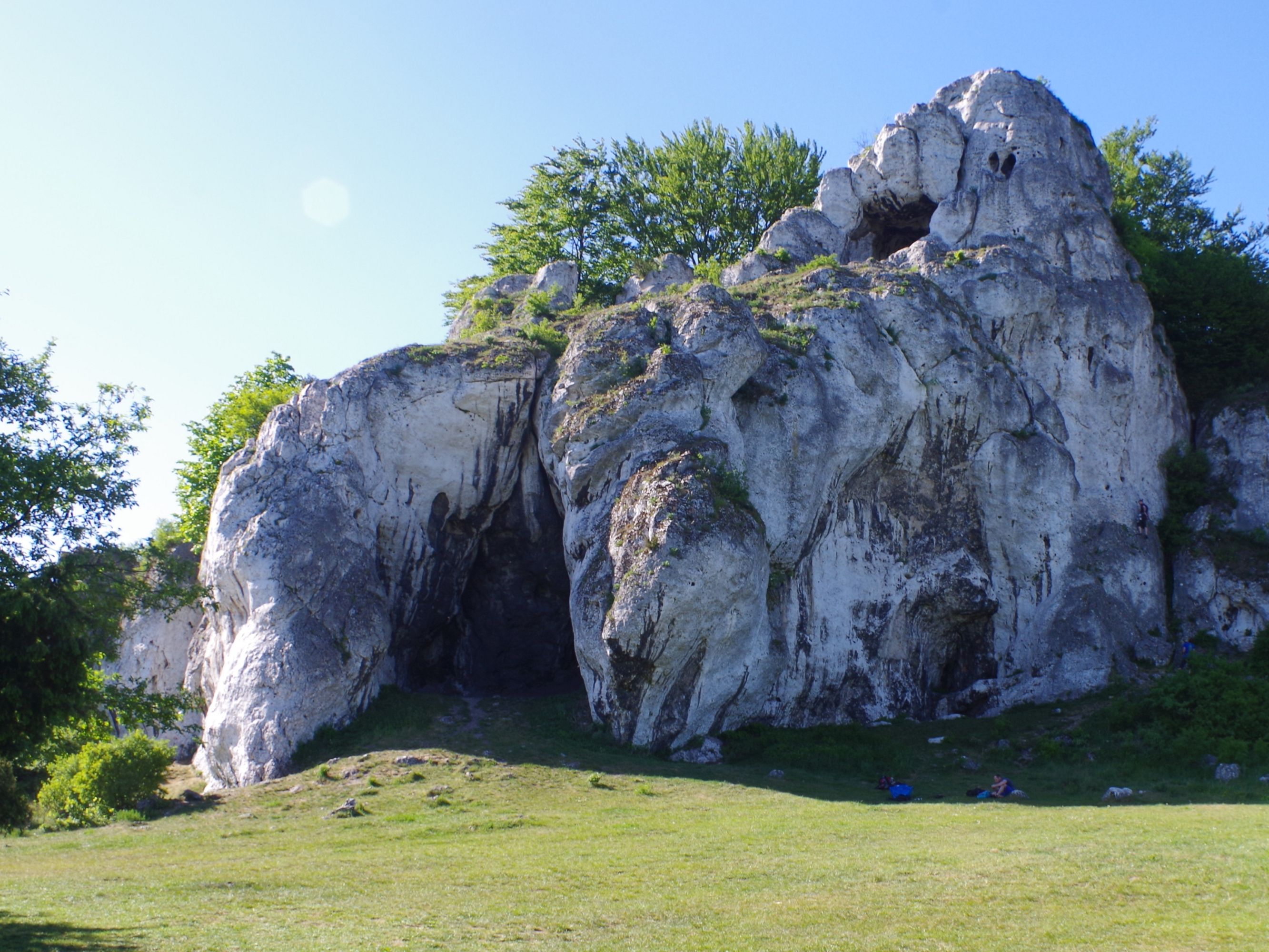 Skały Rzędkowickie